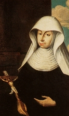 Maria Crescentia Hoss